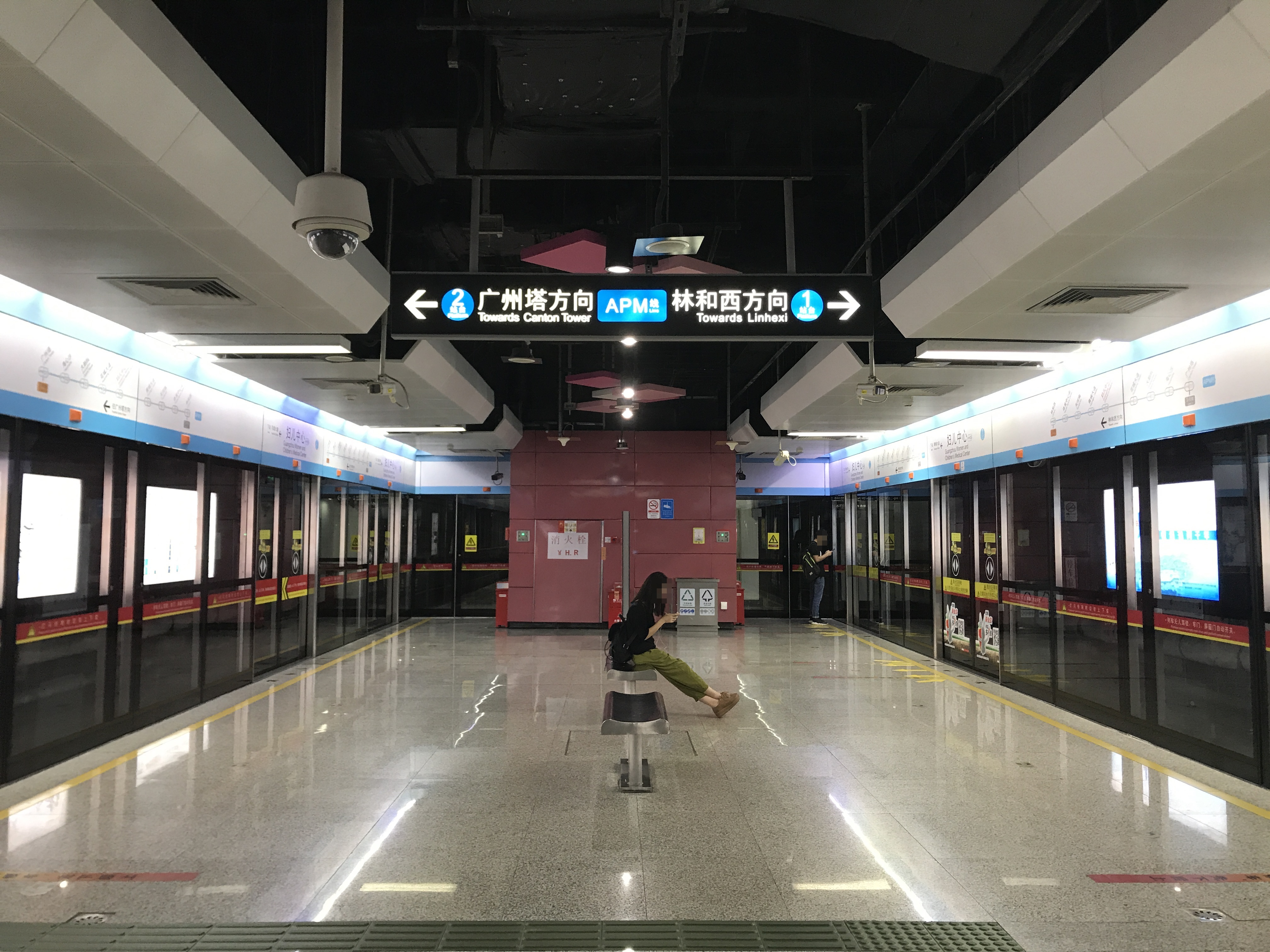 婦児中心駅のホーム